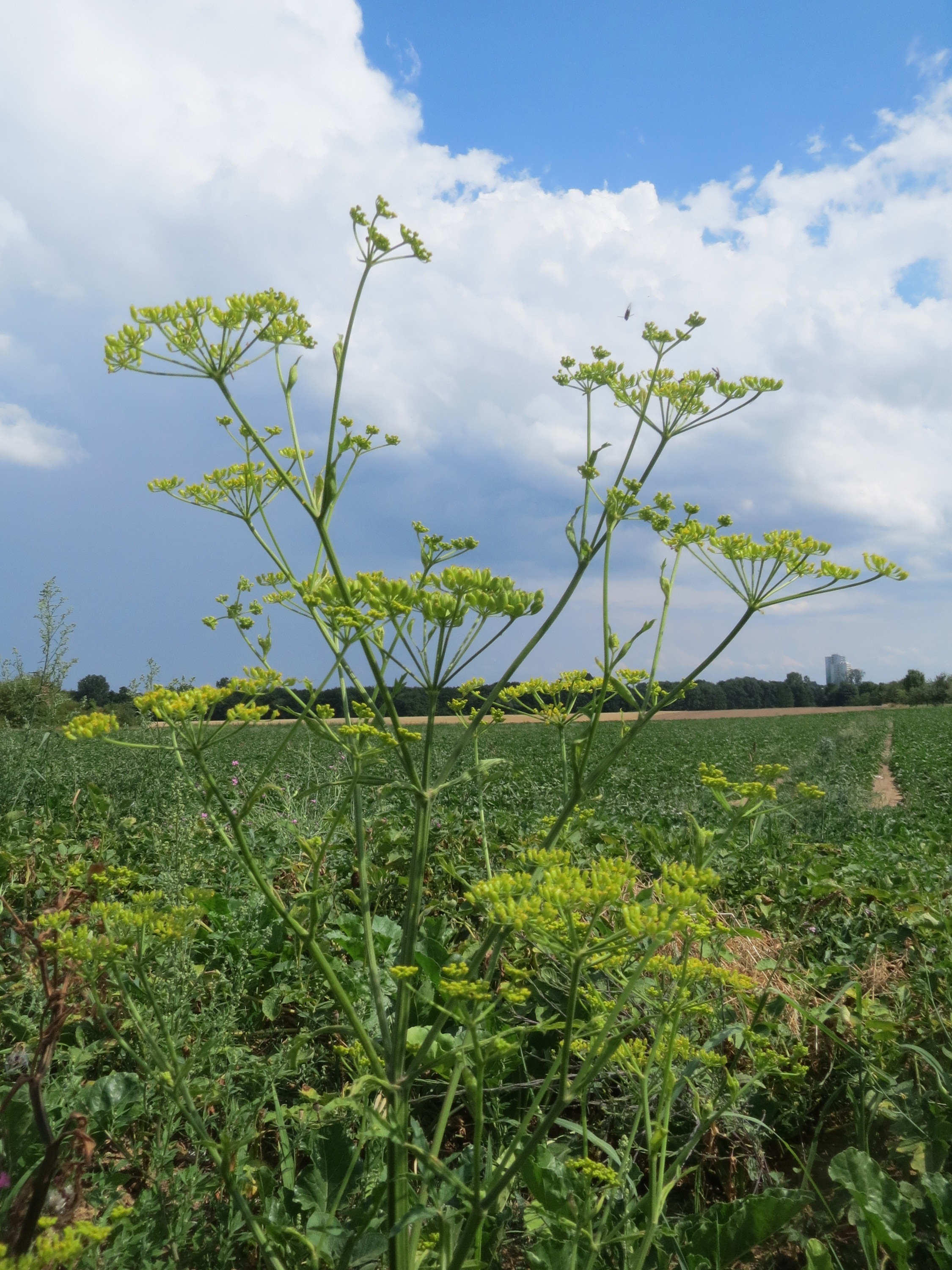 Pastinak (Pastinaca sativa) bei Wiesbaden-Erbenheim